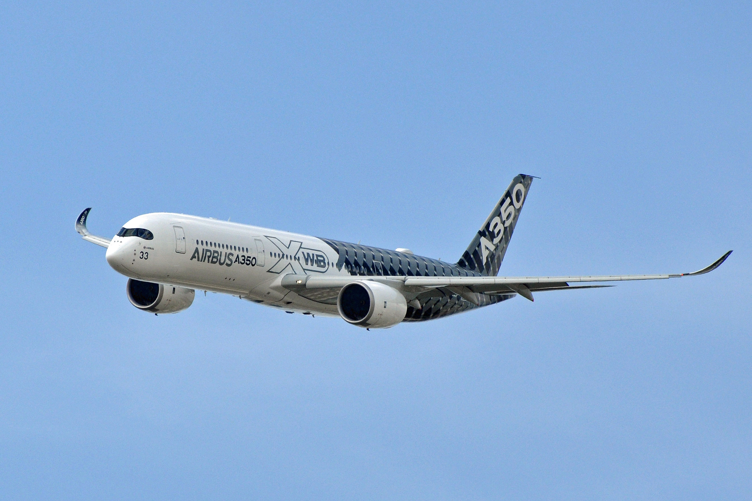 MSN 002 A350-941 AIRBUS INDUSTRIE LBG AIRPORT SIA 2015